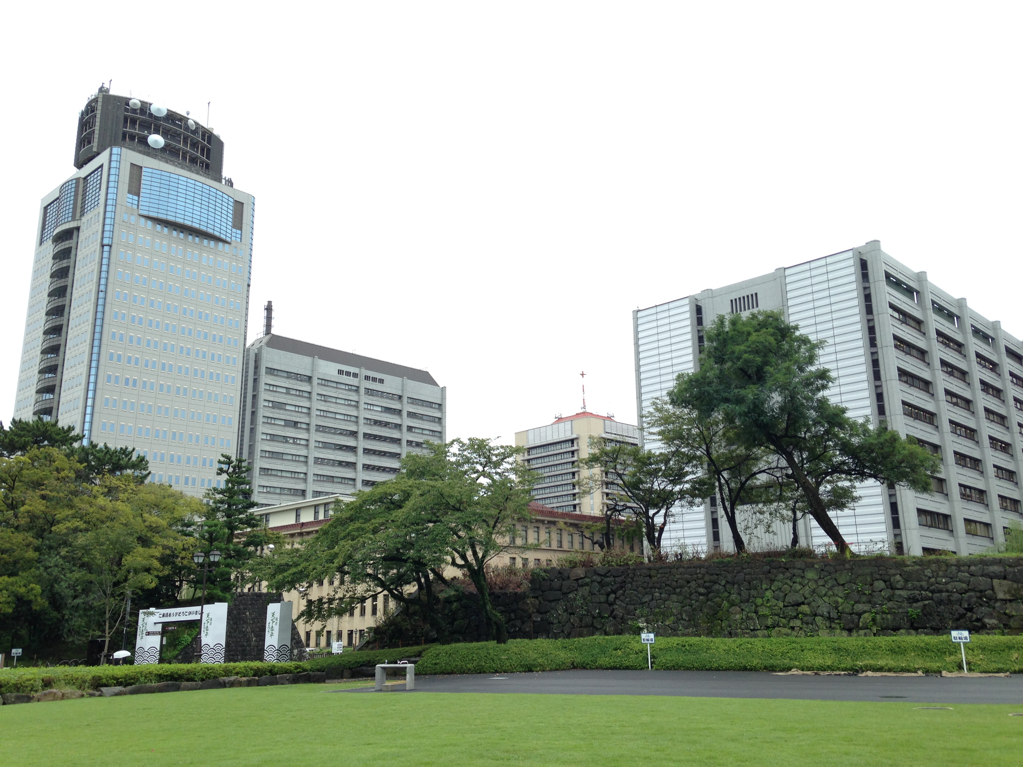 駿府城公園より望む静岡県庁舎